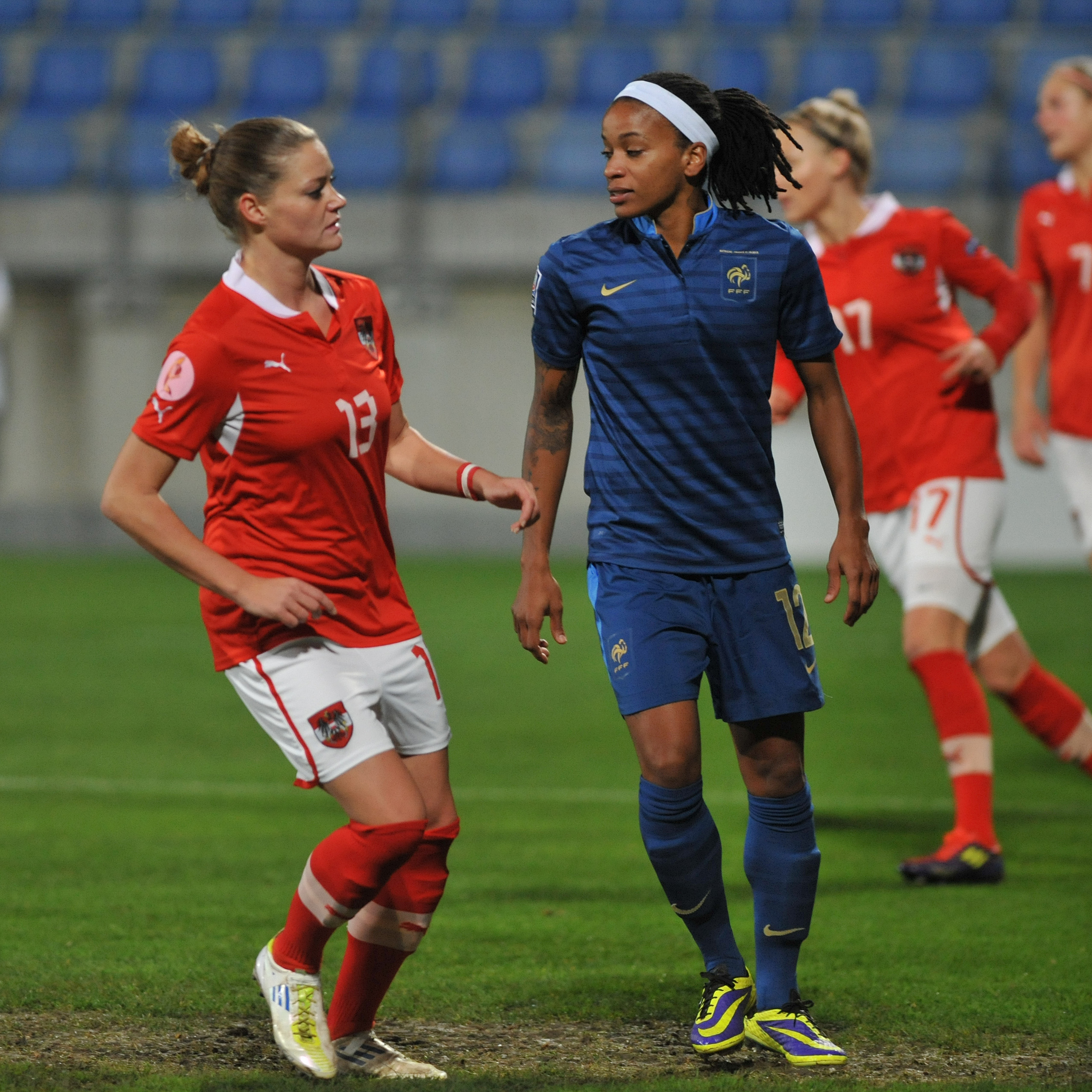 FIFA Women's World Cup 2015 Qualiying Round Österreich - Frankreich am 31. Oktober 2013 in Ritzing: Élodie Thomis